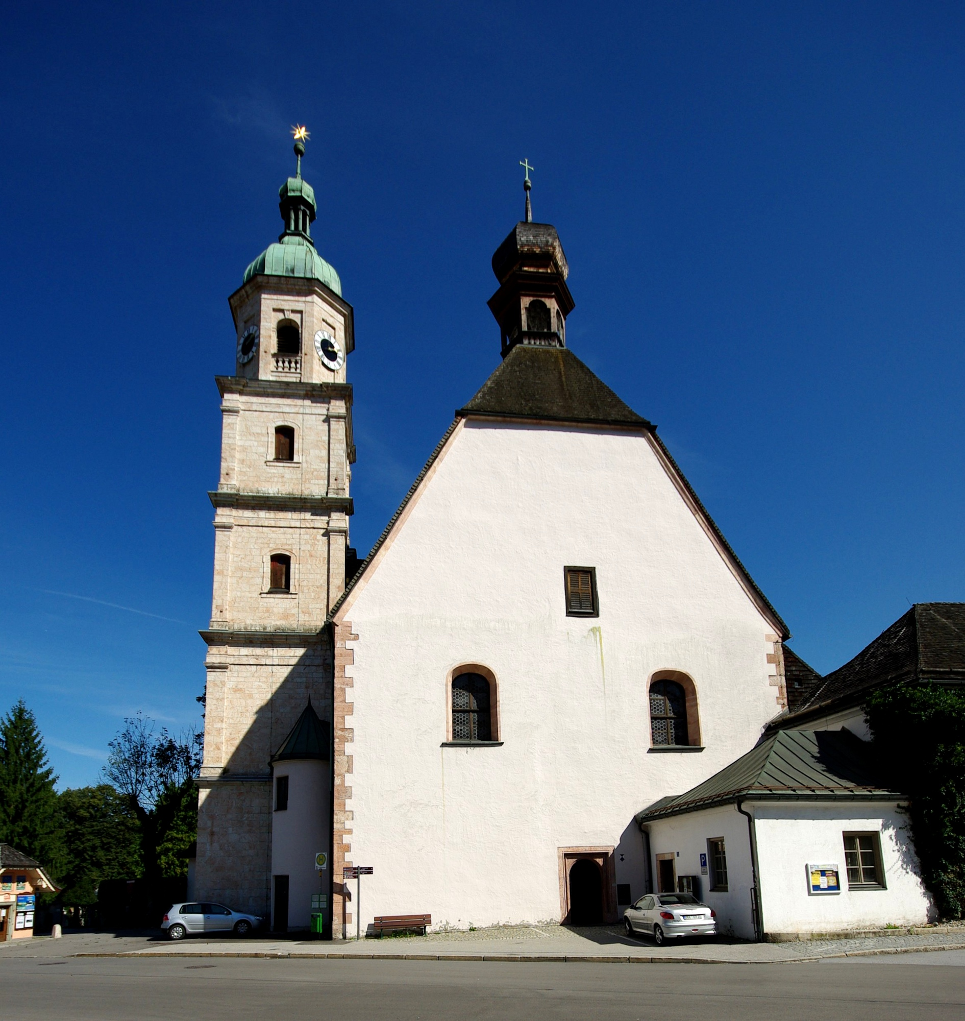 Franziskaner-Klosterkirche, 83471 BerchtesgadenThis is a photograph of an architectural monument.